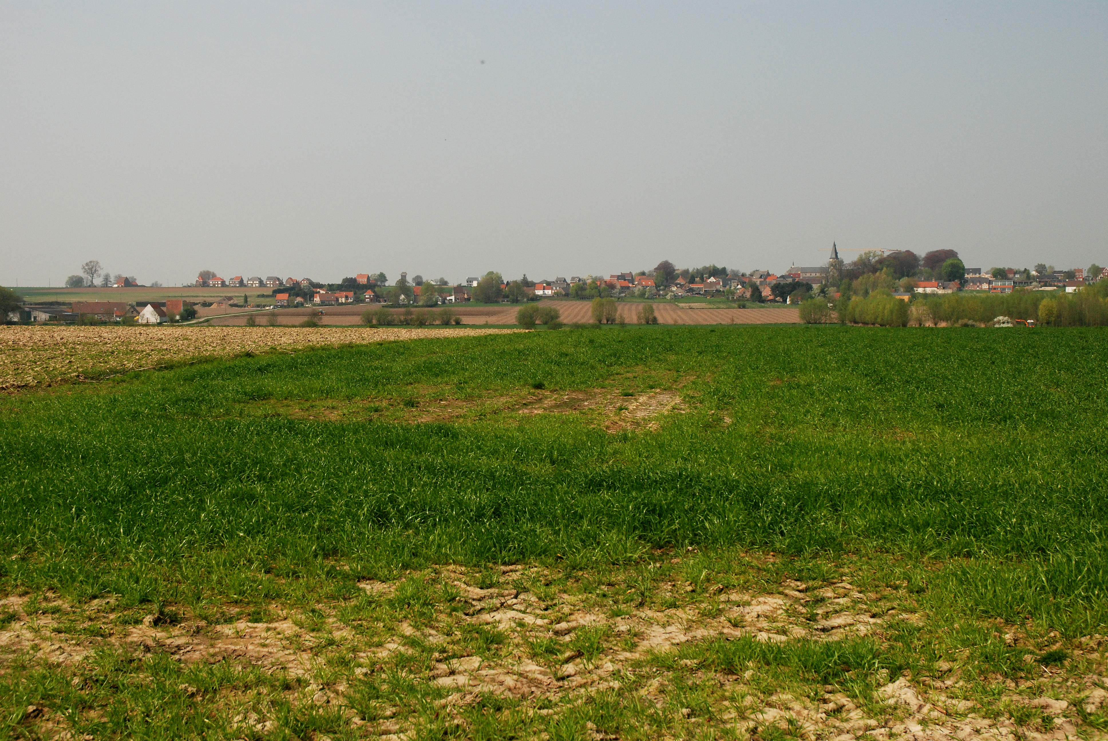 De heuvelrug van Huise, België, gezien vanaf Mullem